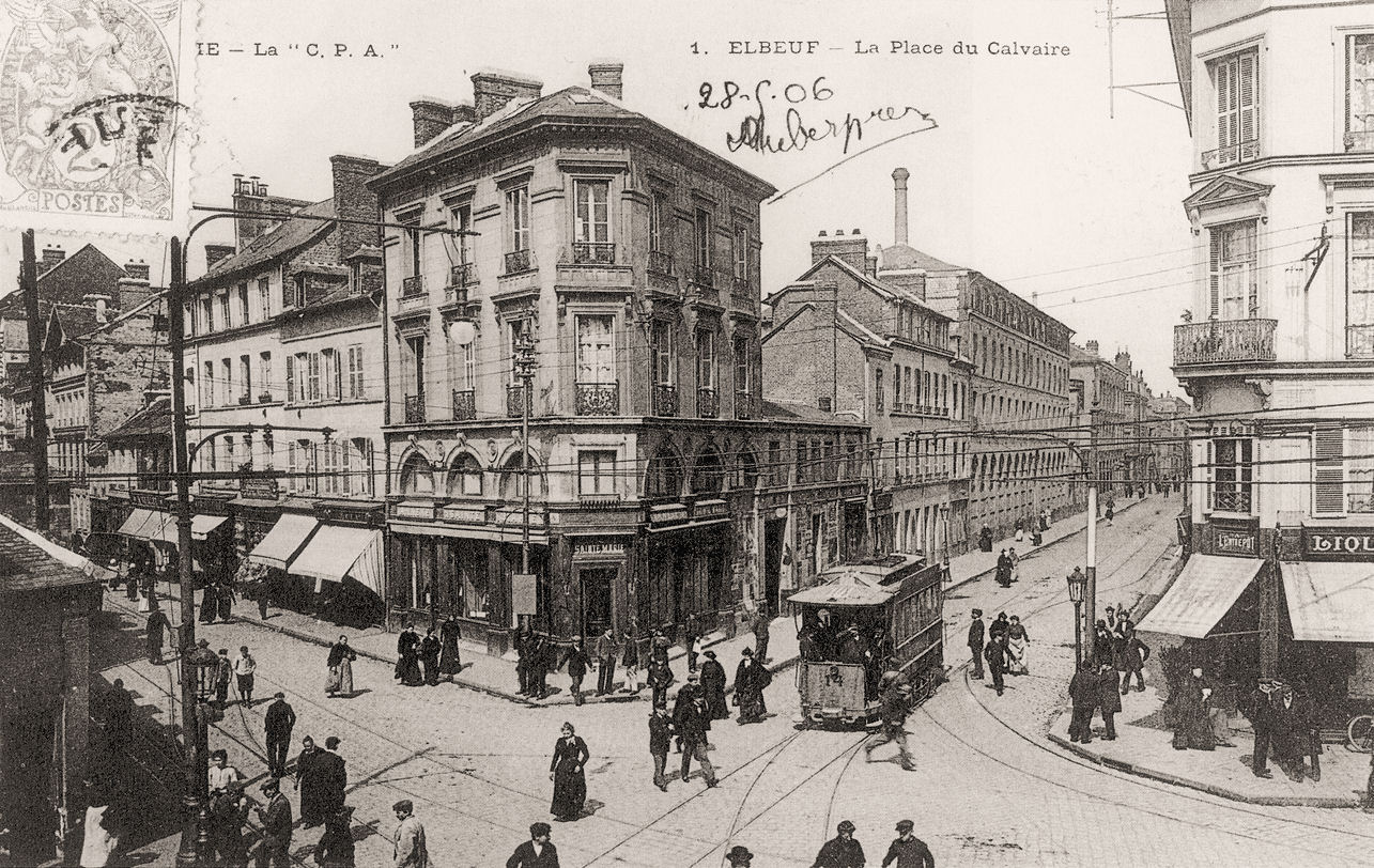 Tramway d'Elbeuf - Place du Calvaire